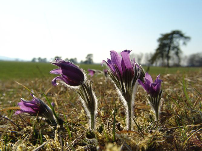 Küchenschellen im Wollmatinger Ried